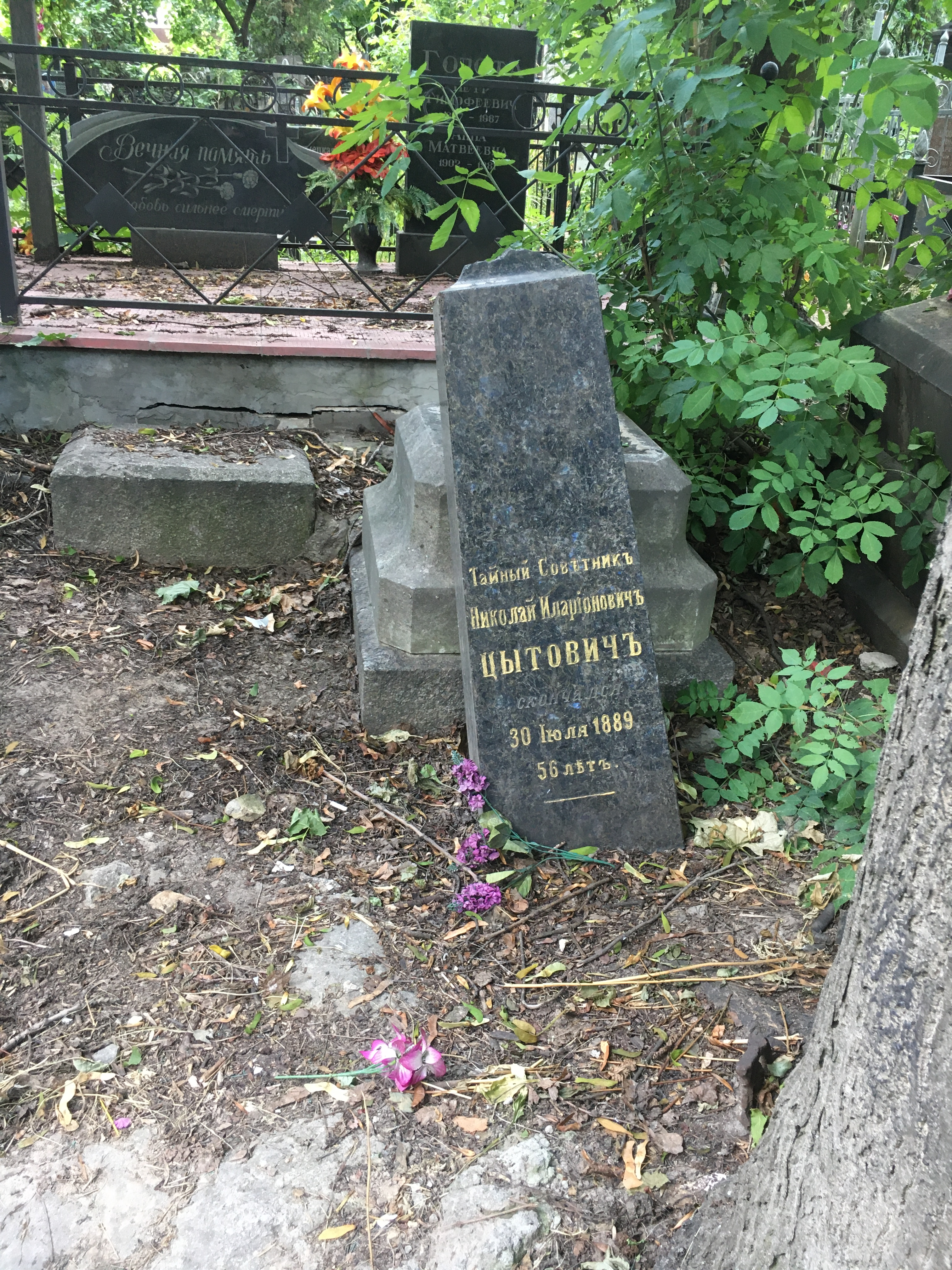 Надгробный памятник Цитовича Николая Илларионовича на Байковом кладбище в Киеве